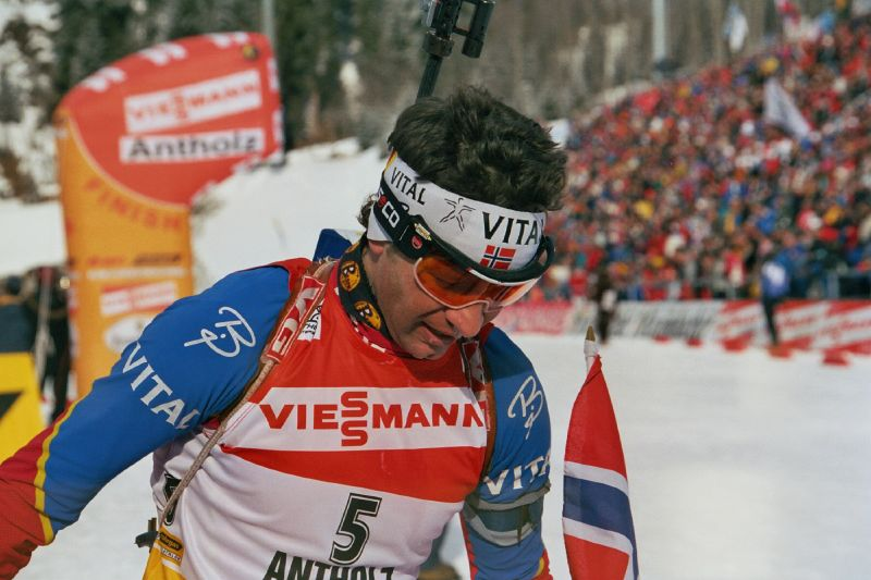 Biathlete Ole Einar Bjørndalen